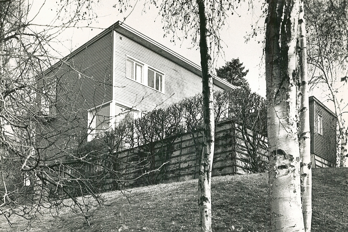 Villa i Anne Maries vei 16, Oslo, ca. 1982-1983. Arkitekt Magnus Poulsson